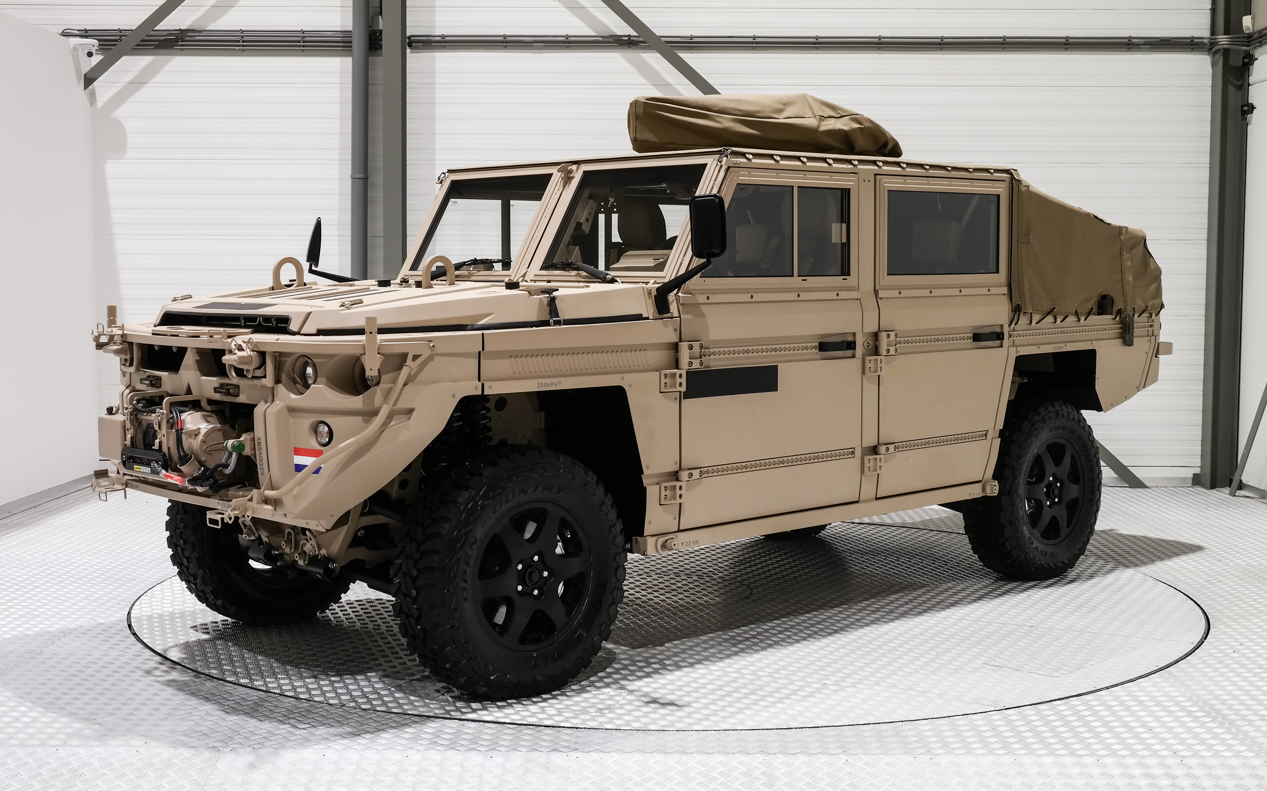 Voorzijde van de VECTOR.